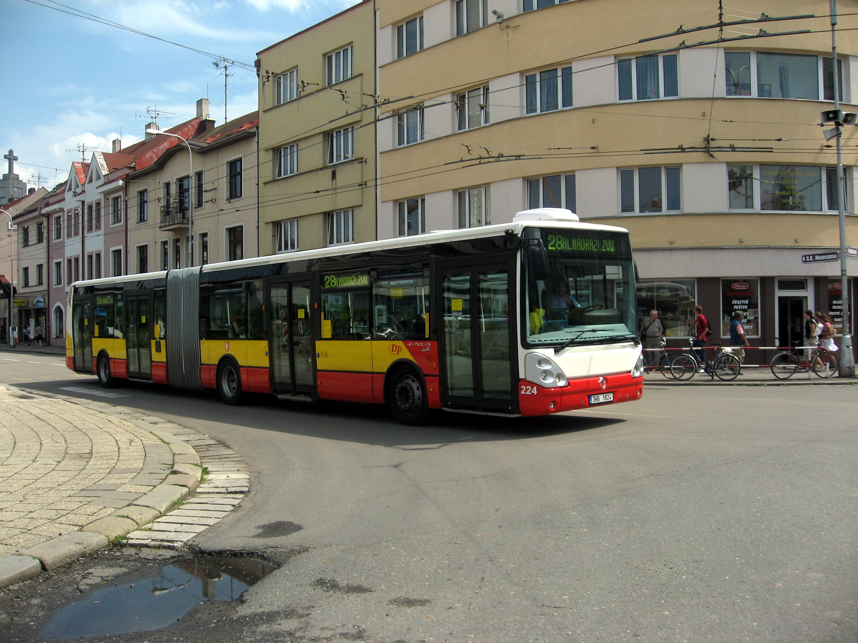 Hradec Králové, autobus v ulici S. K. Neumanna u křižovatky s Puškinovou